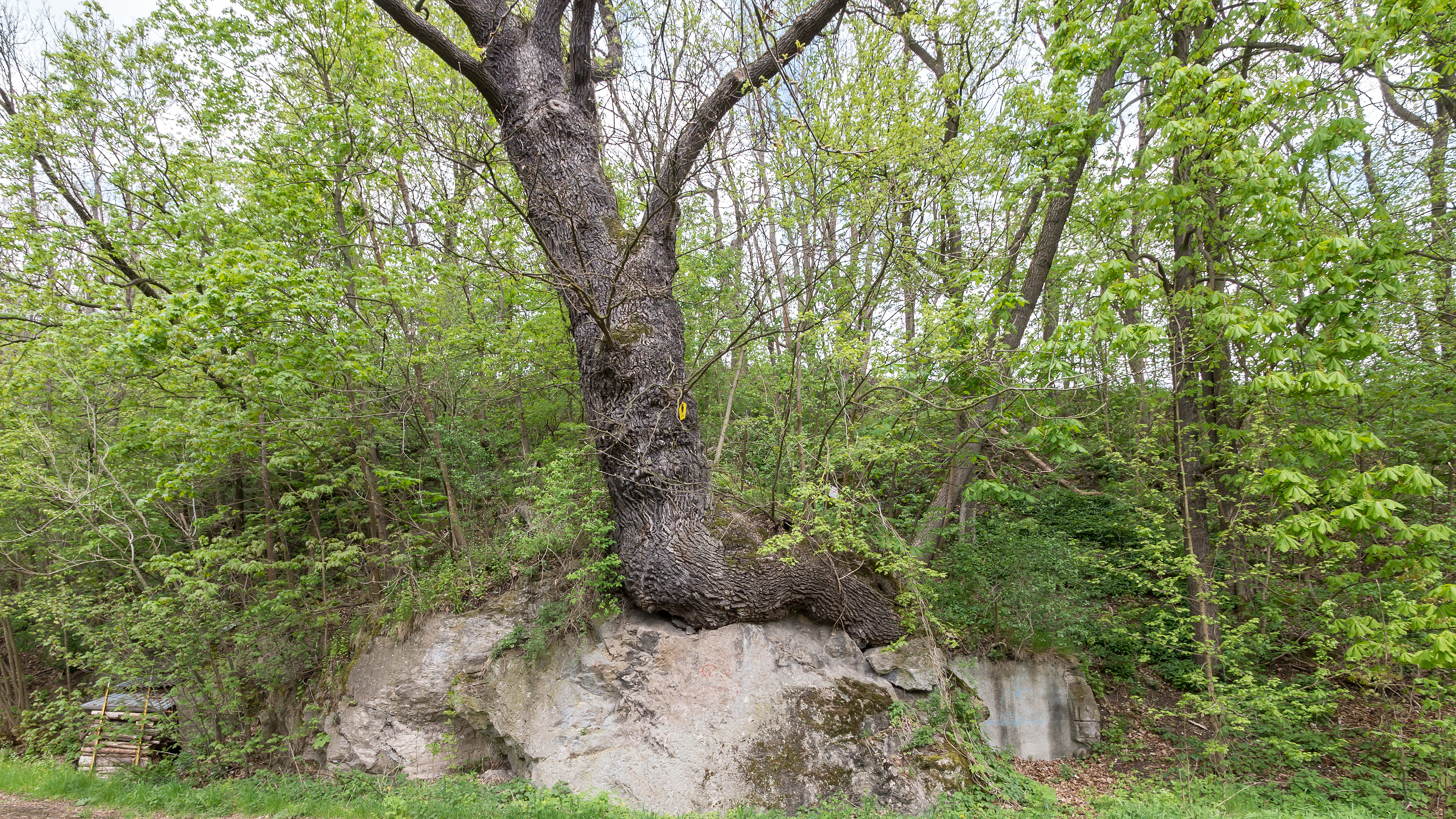 Georgs-Eiche Listen Nr. 8 Leutnitz II